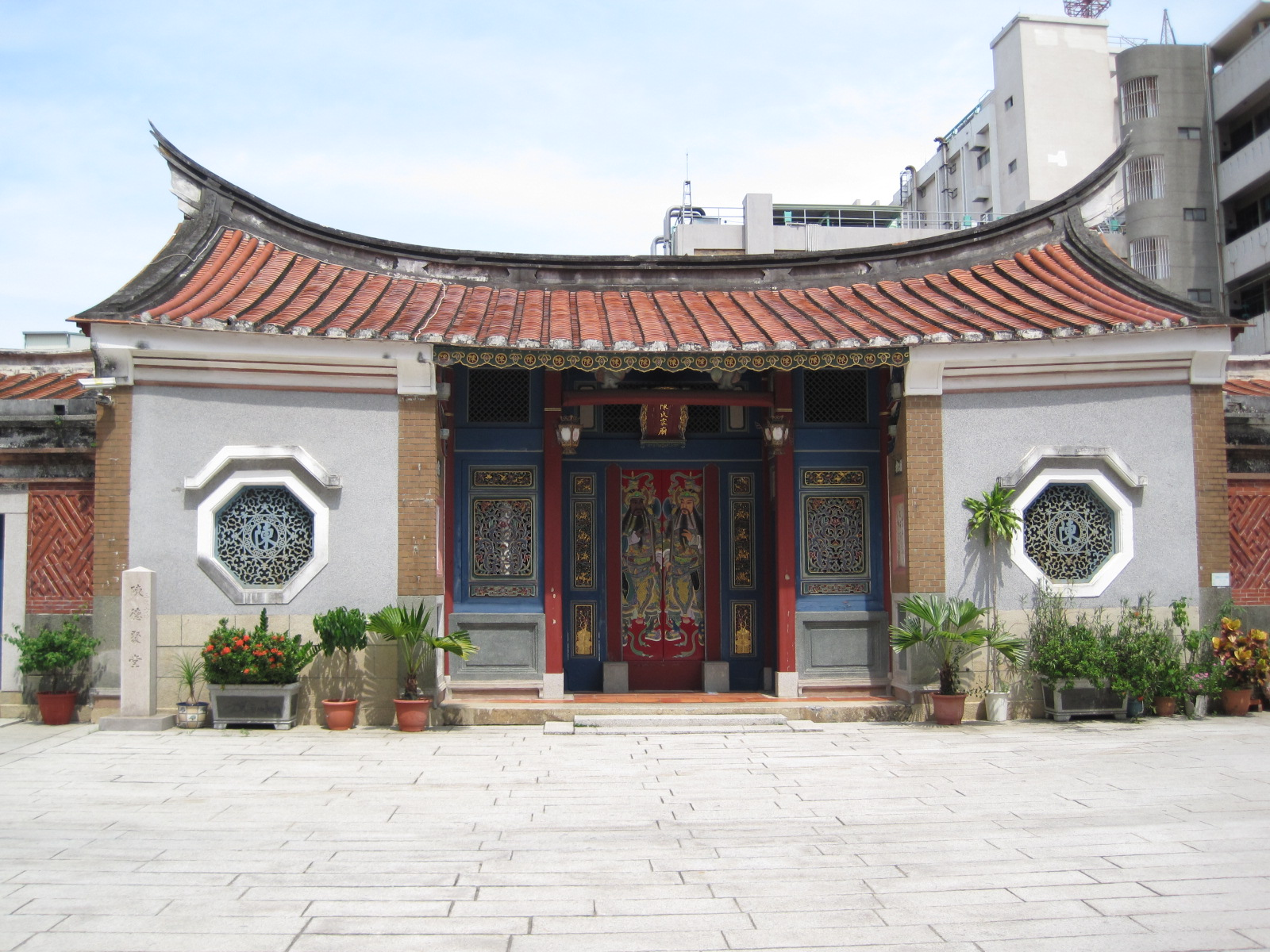 臺南陳德聚堂